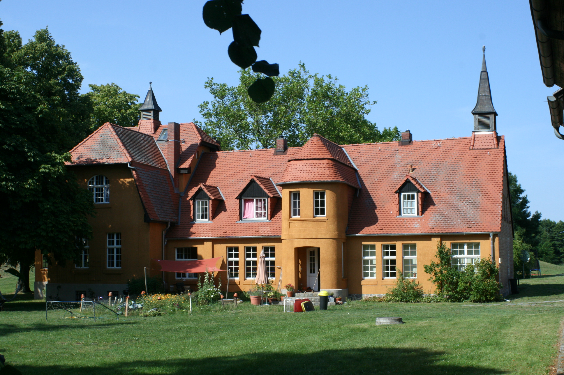 Mirow, Ortsteil Blankenförde. Ehemaliges Gutshaus.